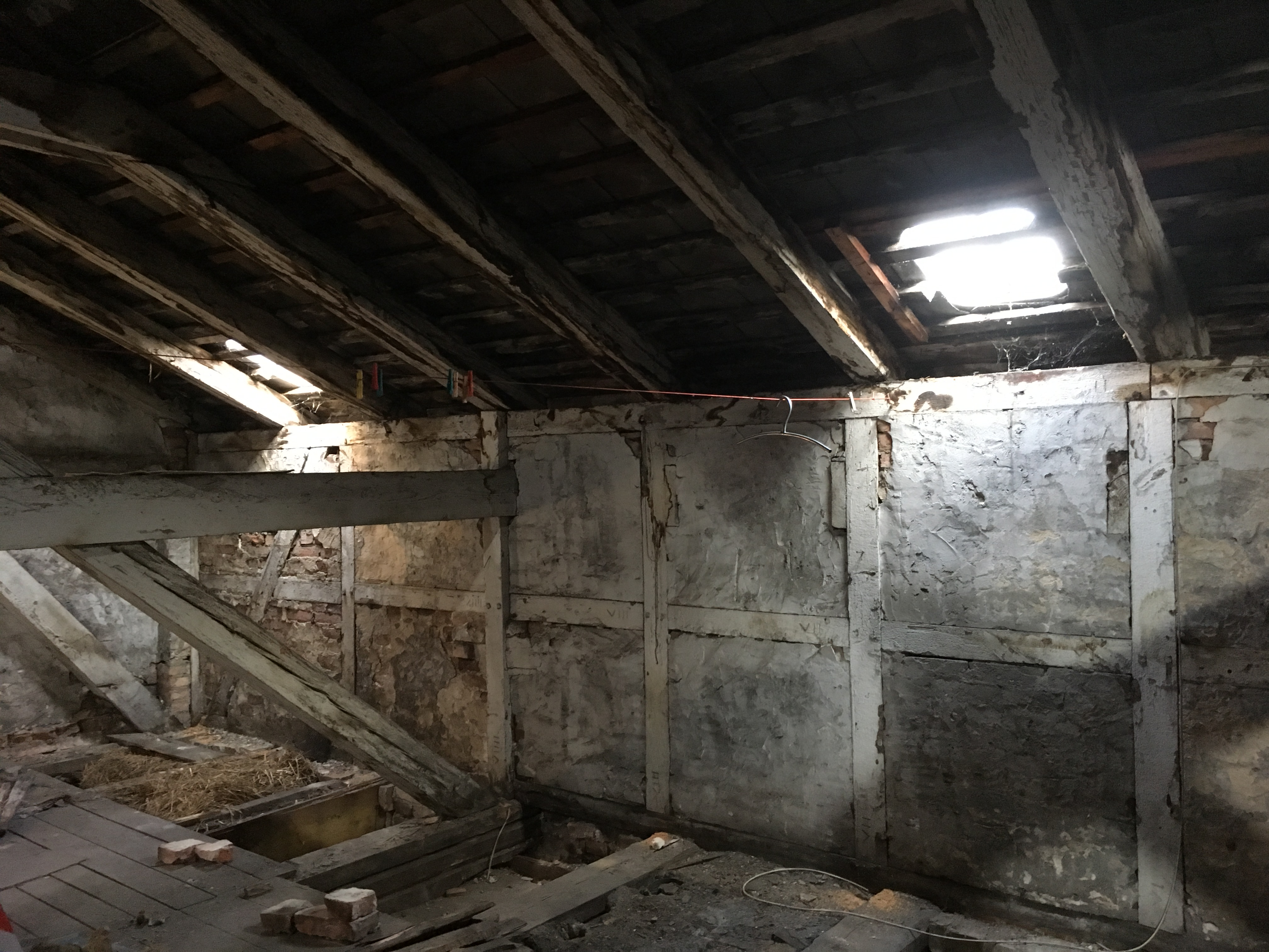 Dachstuhl